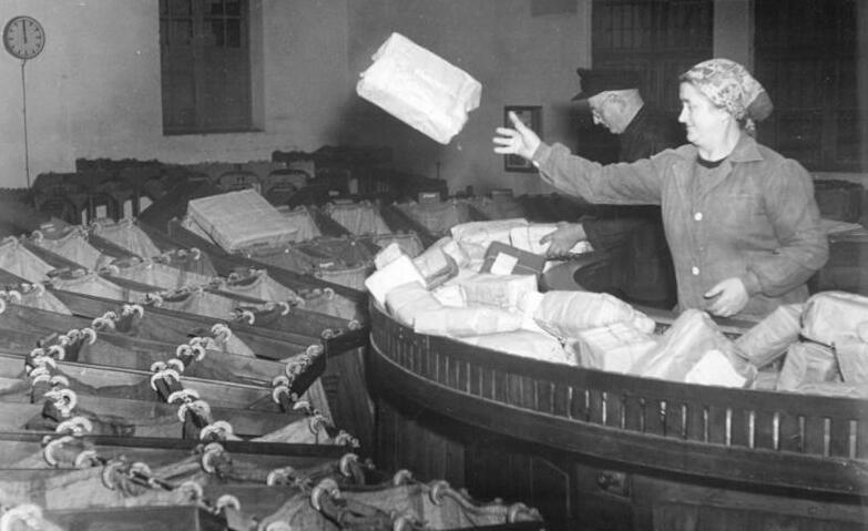 Zentralbild Junge 20.11.1953 Hochbetrieb im Postamt Berlin O 17 Viele Tausende von Paketen und Päckchen verlassen jetzt täglich kurz vor Weihnachten das Postamt Berlin 0 17, um noch rechtzeitig am Weihnachtsabend an Ort und Stelle zu sein. UBz: Marta Mettke in der Päckchenverteilungsstelle hat alle Hände voll zu tun. Sie sortiert die Päckchen nach den Bestimmungsorten.